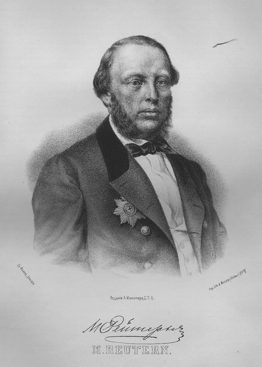 Рейтерн, Михаил Христофорович